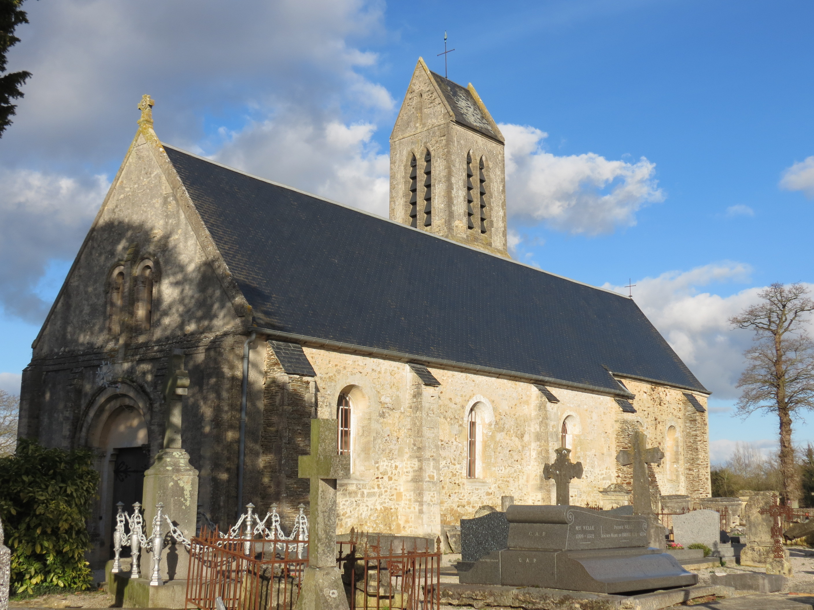 Le Breuil-en-Bessin - église